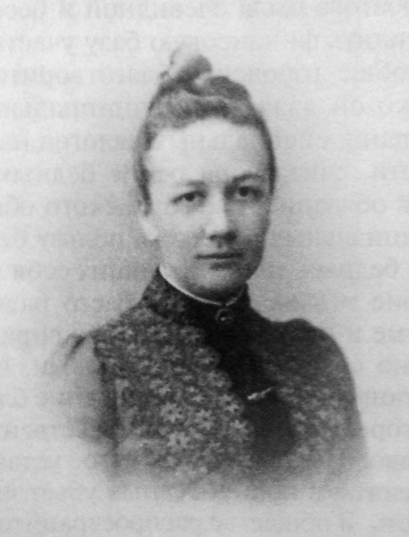 Ольга Александровна Щербатова (1861—1892), супруга Михаила Алексеевича Веневитинова (1844—1901).